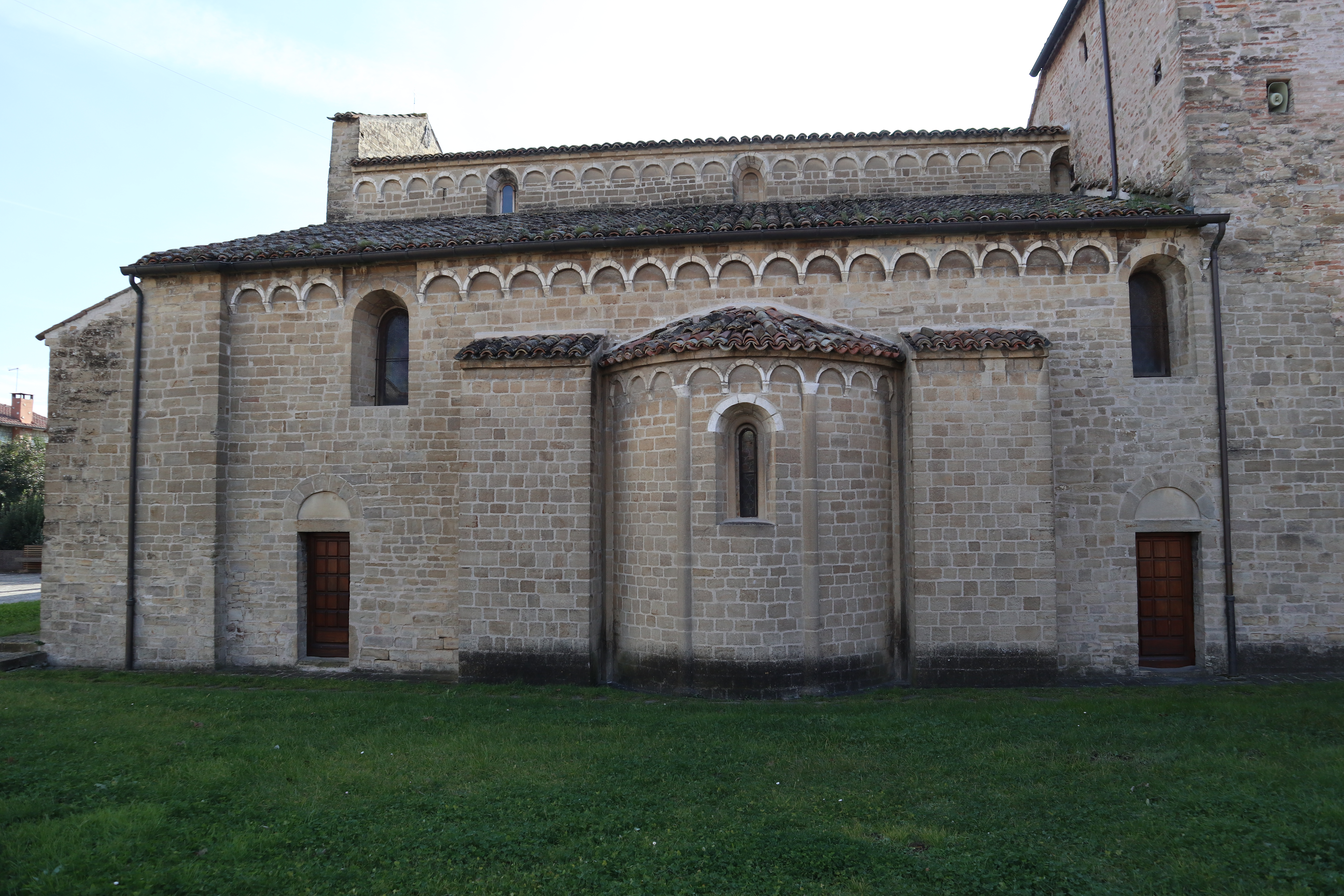 XII secolo